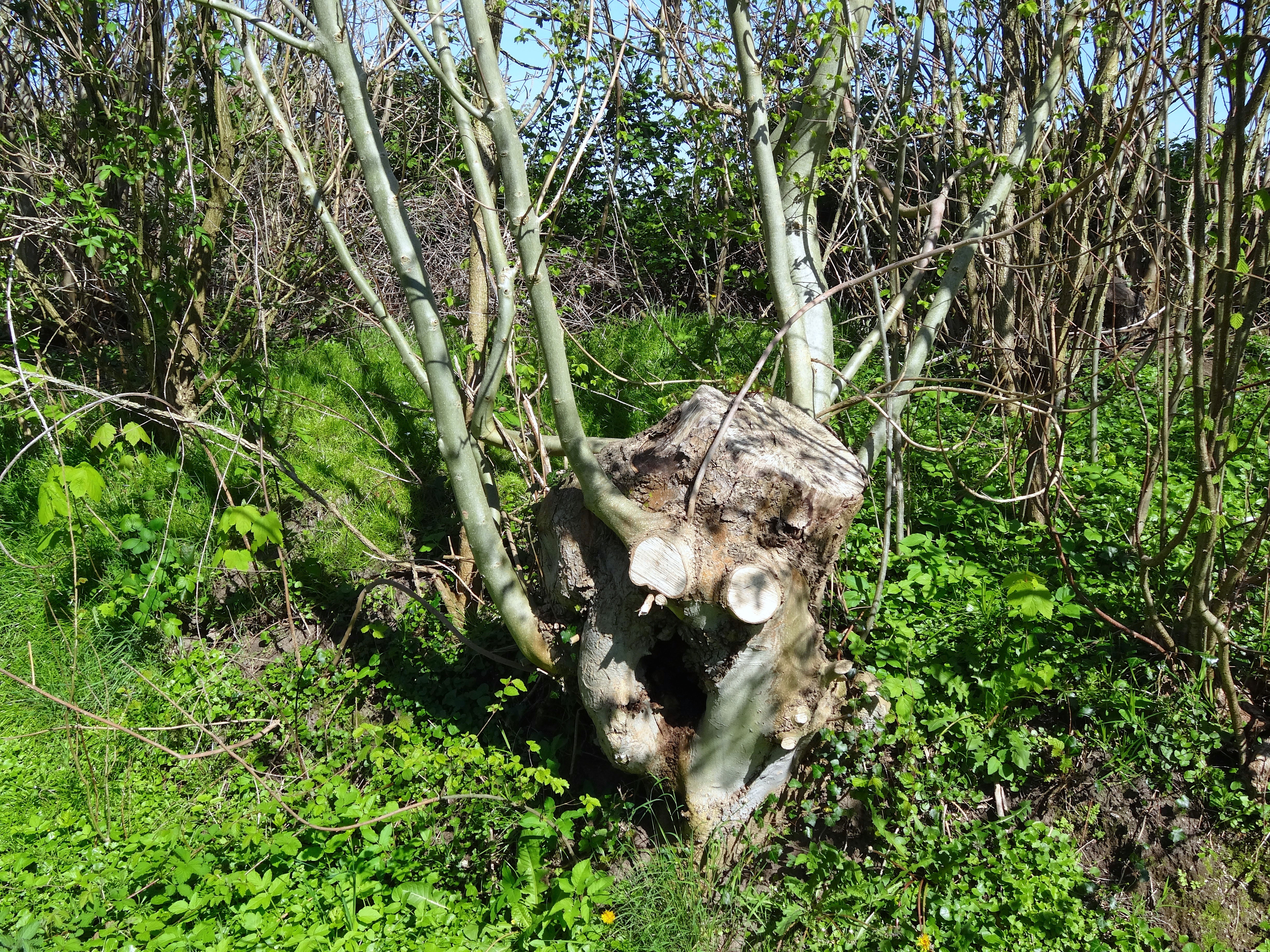 Essenstoof in de Geldringensteeg ten zuiden van Steenwijkerwold